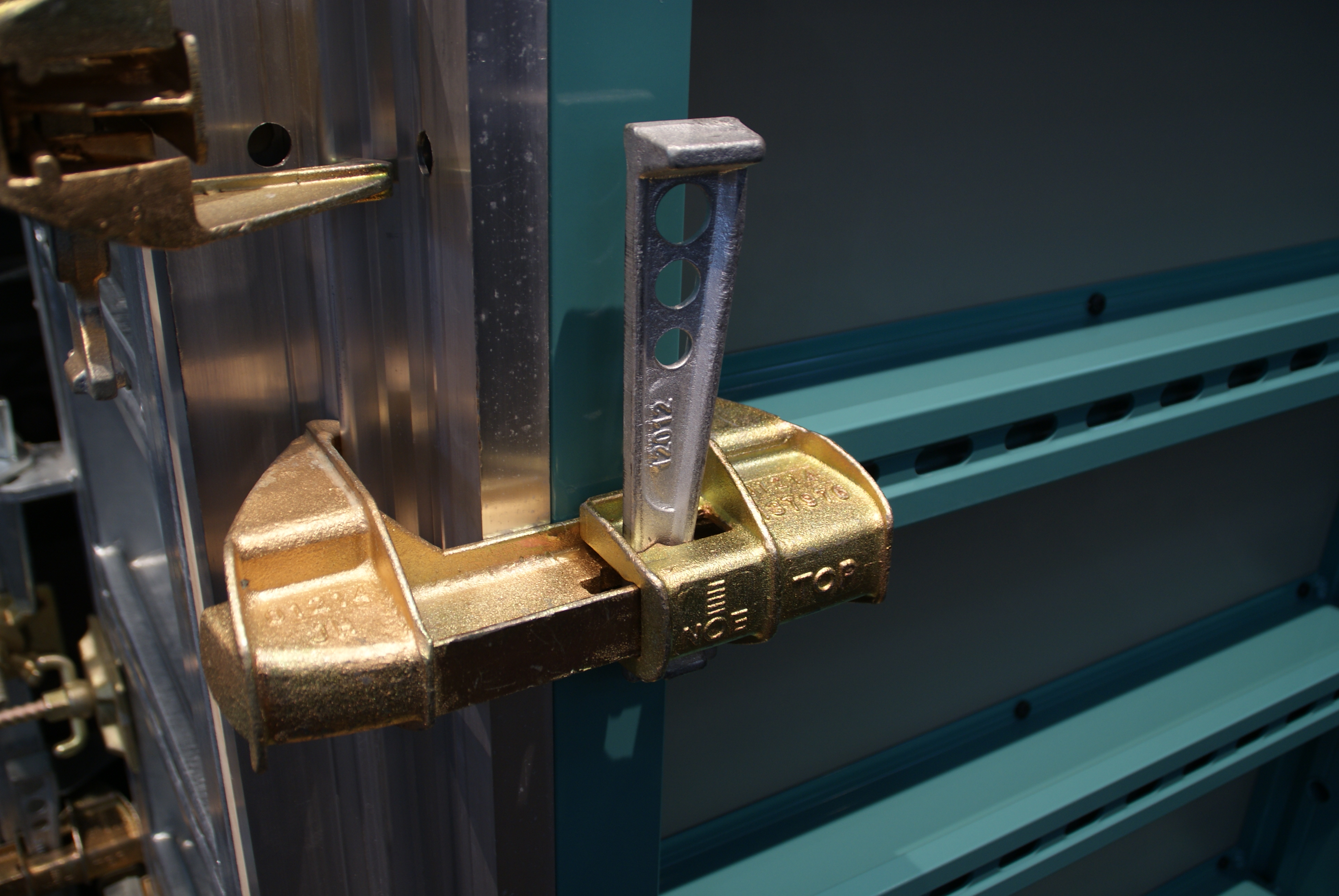 Detailaufnahme Schalungsschloss der Fa. NOE